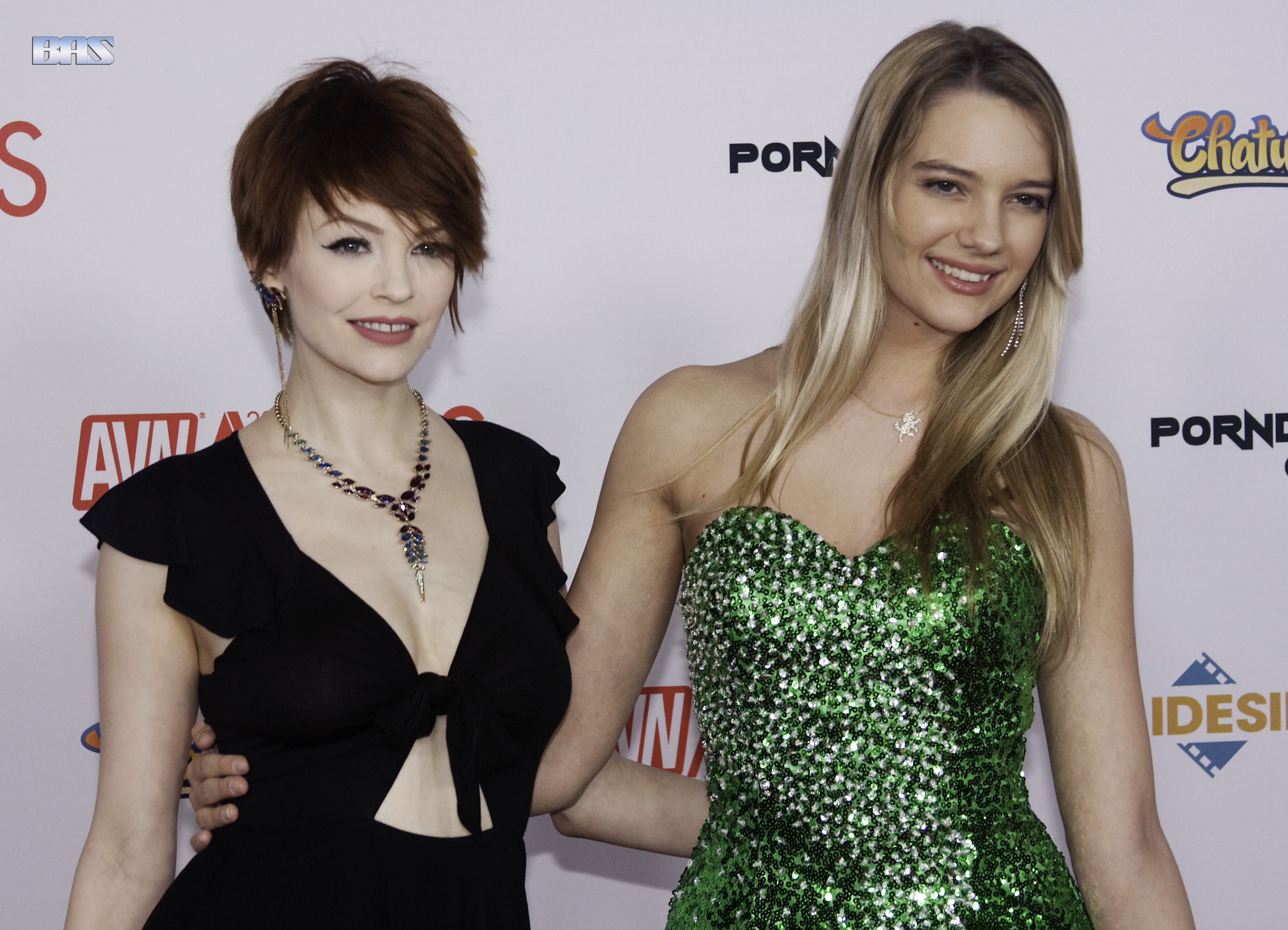 AVN16_0409bas